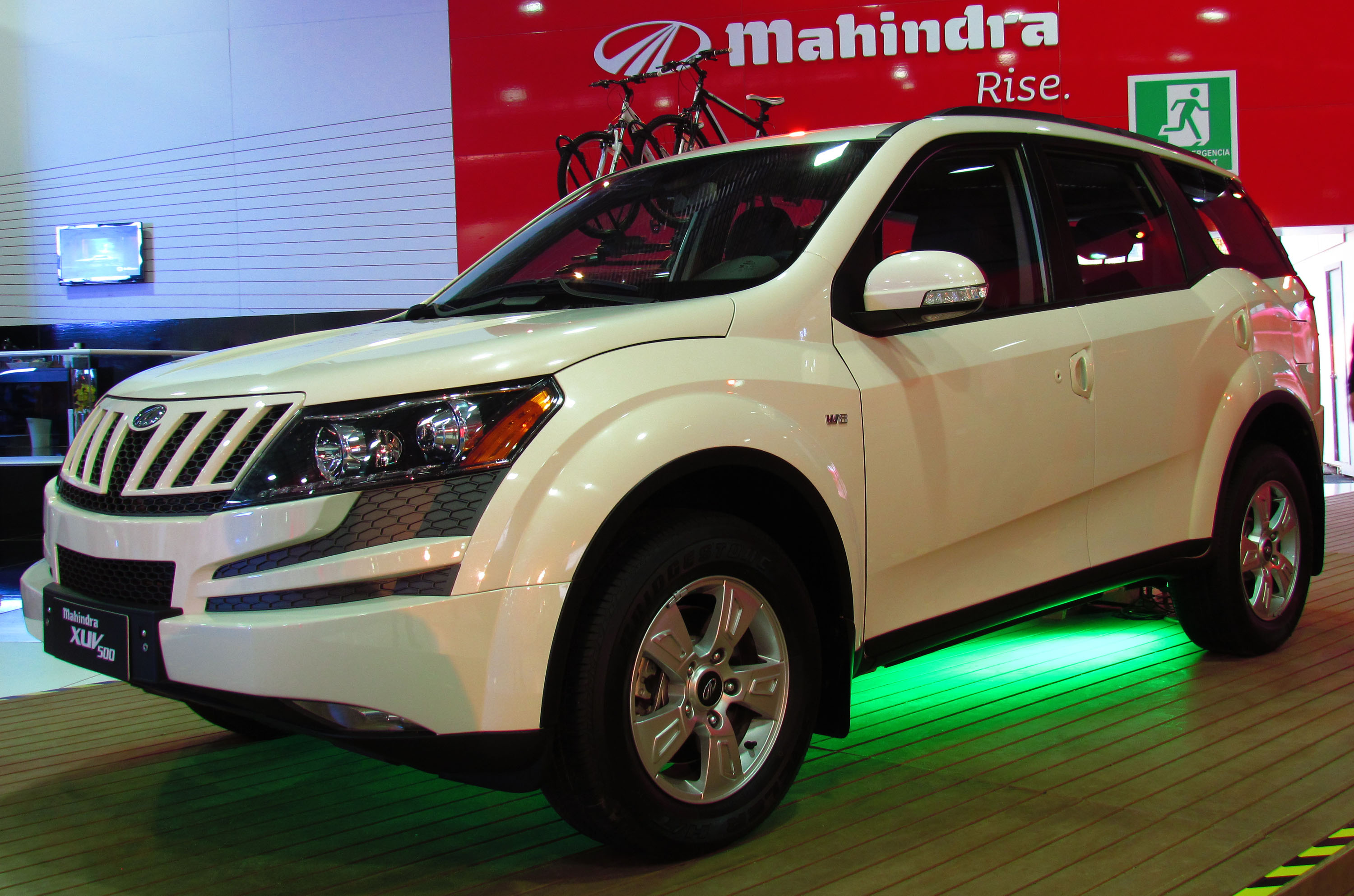 Mahindra XUV500